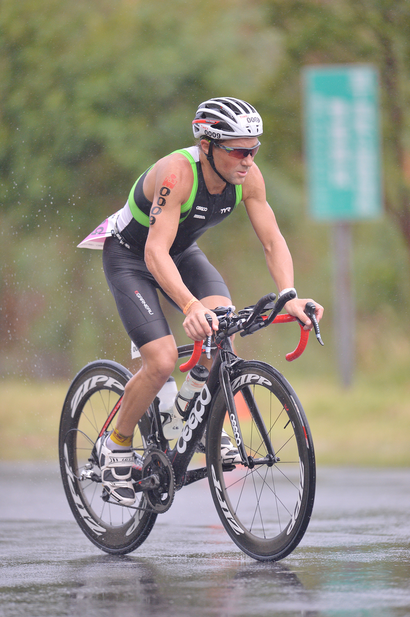 Justin Granger on bike at 2013 Ironman Taiwan